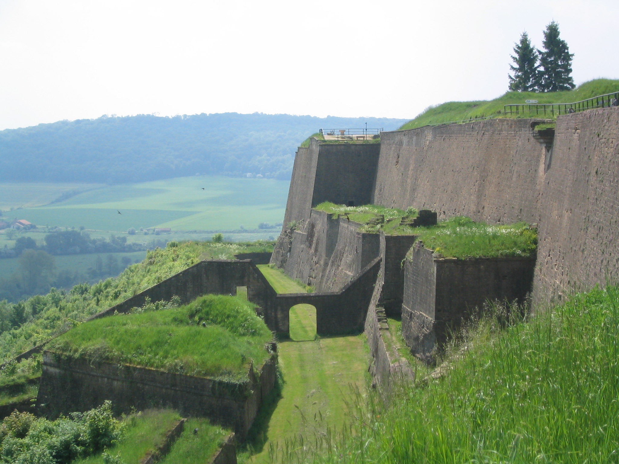 Fortifications Vauban de Montmédy (Meuse, France)